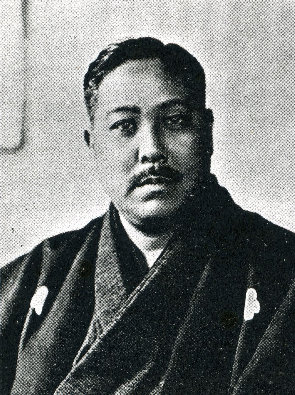 この写真は、牧山耕蔵（1882-1961）の写真です。